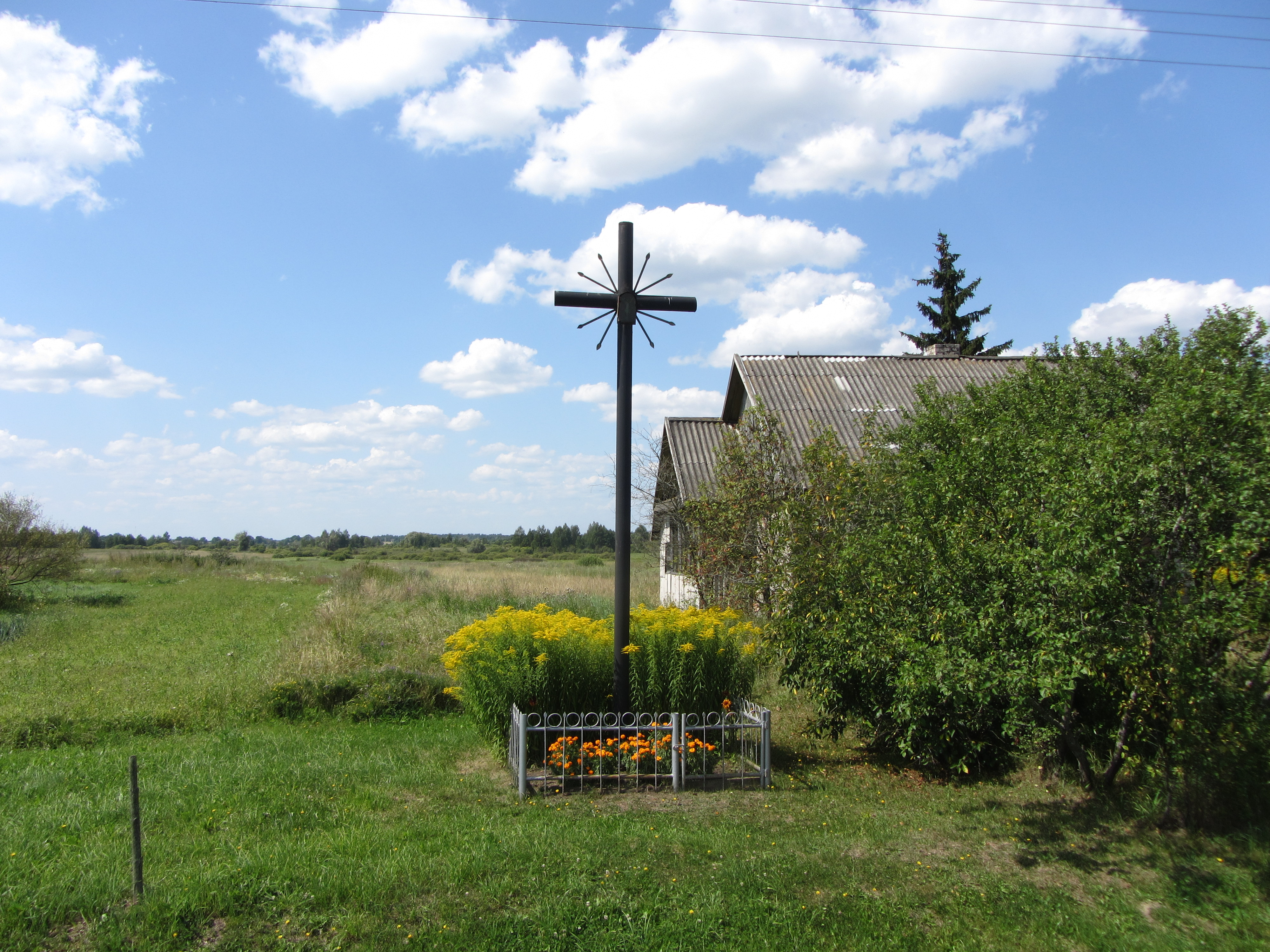 Lazdiniai, Lithuania